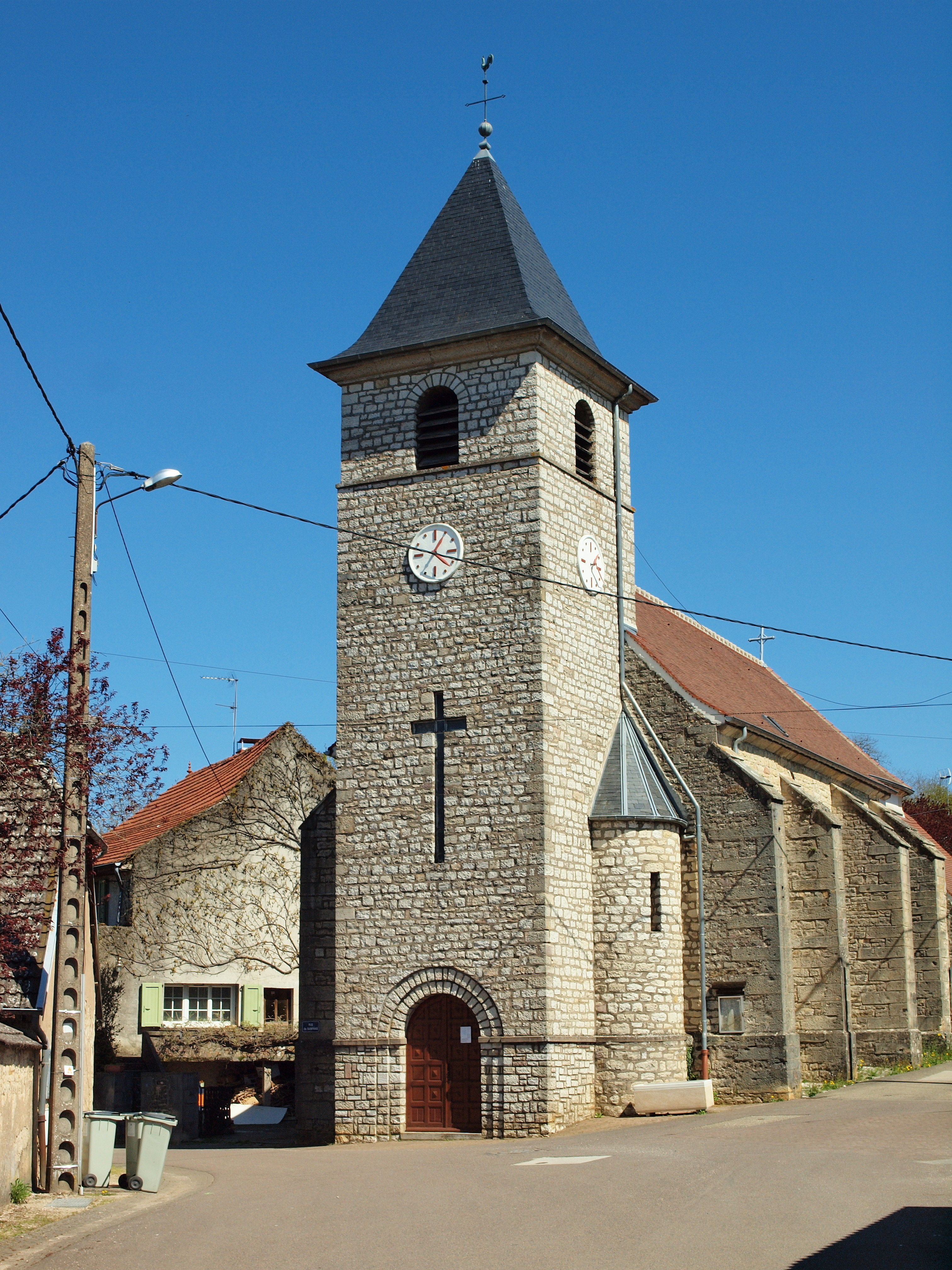 Monnières (Jura, France)